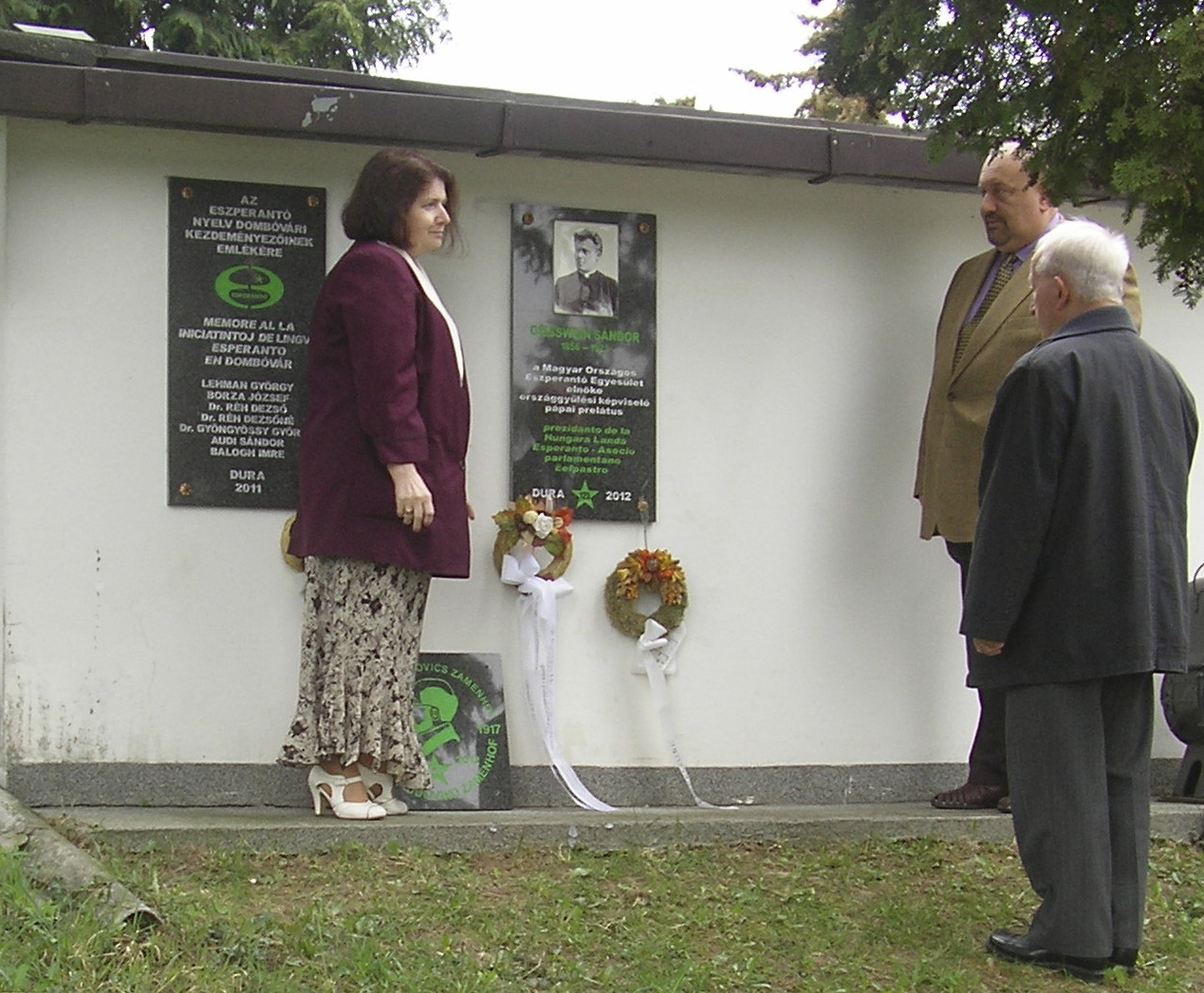 Kronado de esperantistaj gastoj.